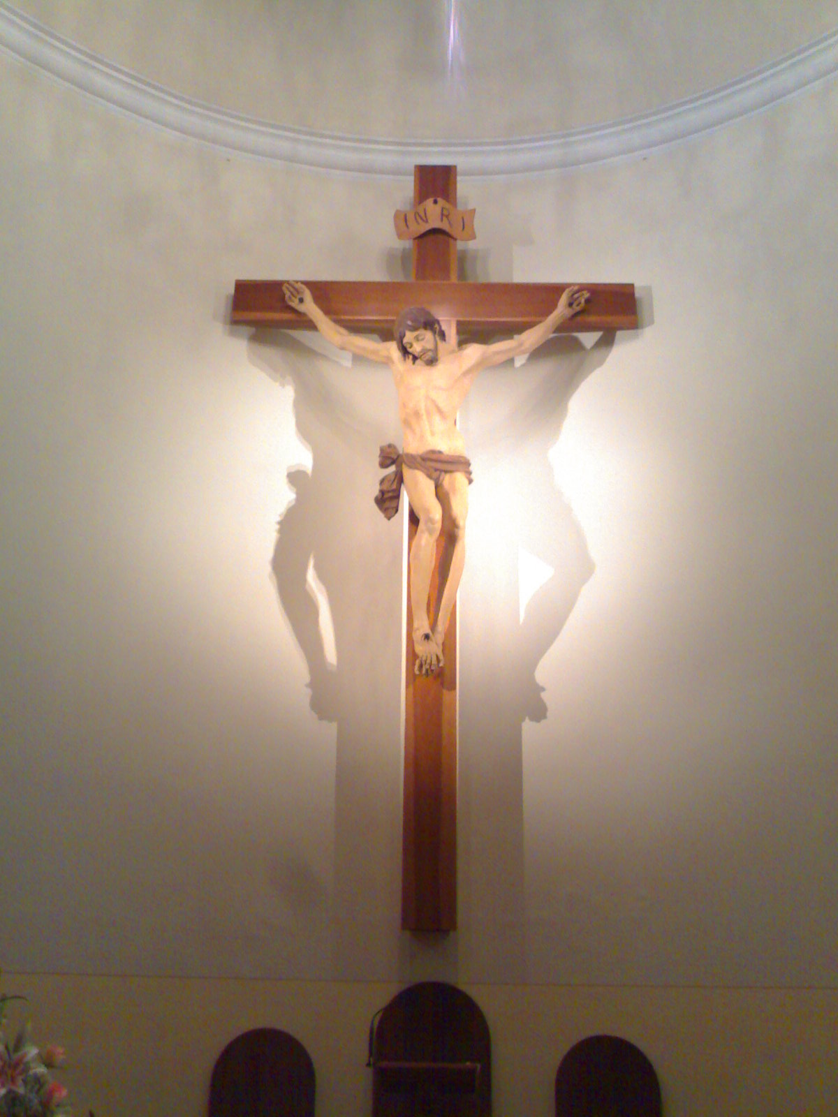 Crocifisso nella Chiesa del Sacro Cuore di Montepulciano Stazione (Siena)